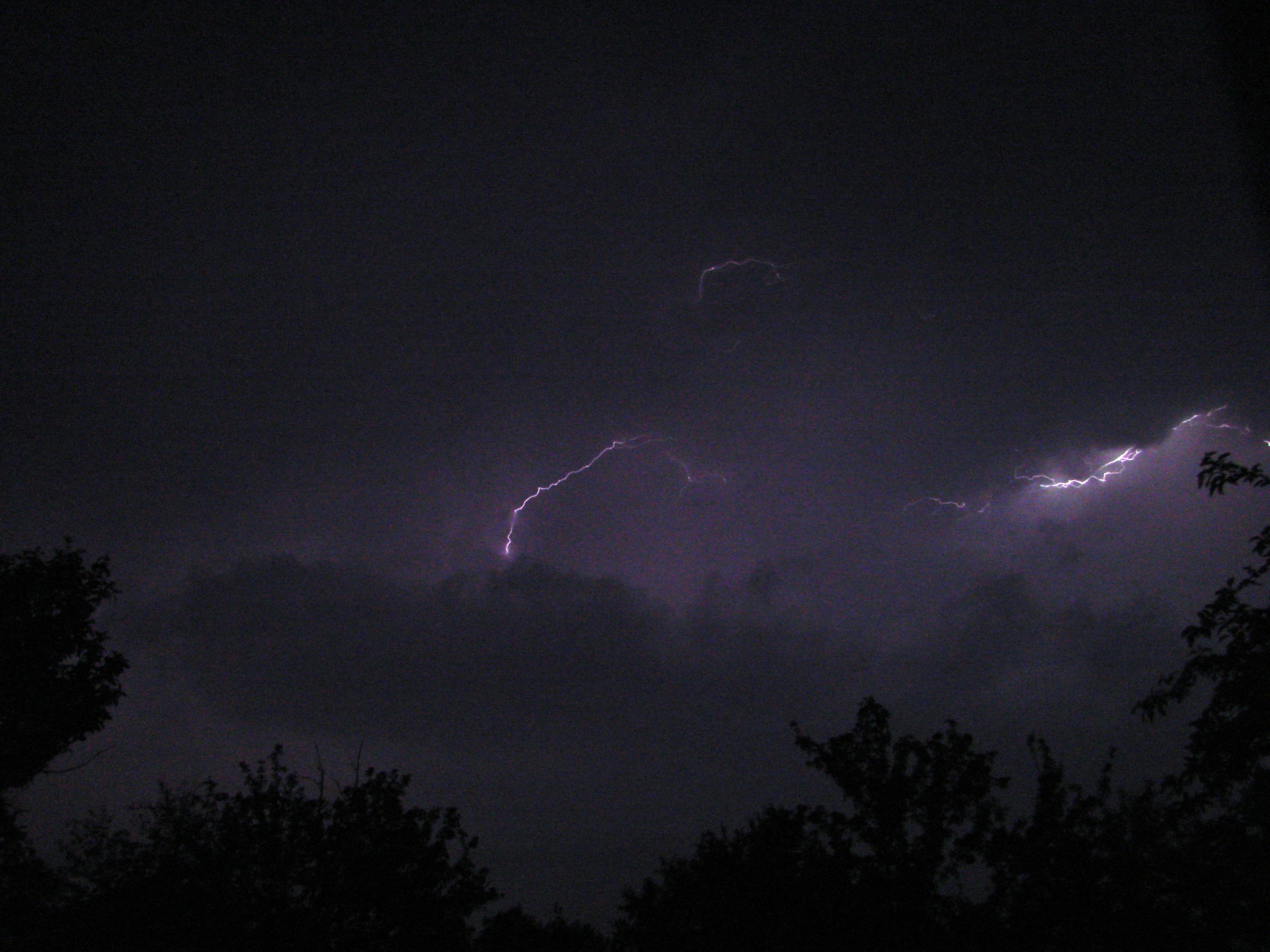 Ночная гроза.